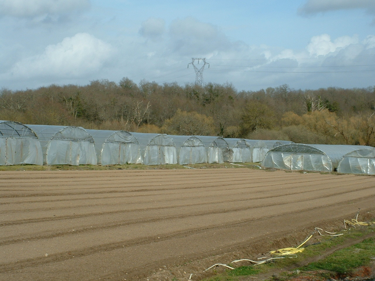 Vue partielle d'une exploitation maraîchère au sud de Rezé